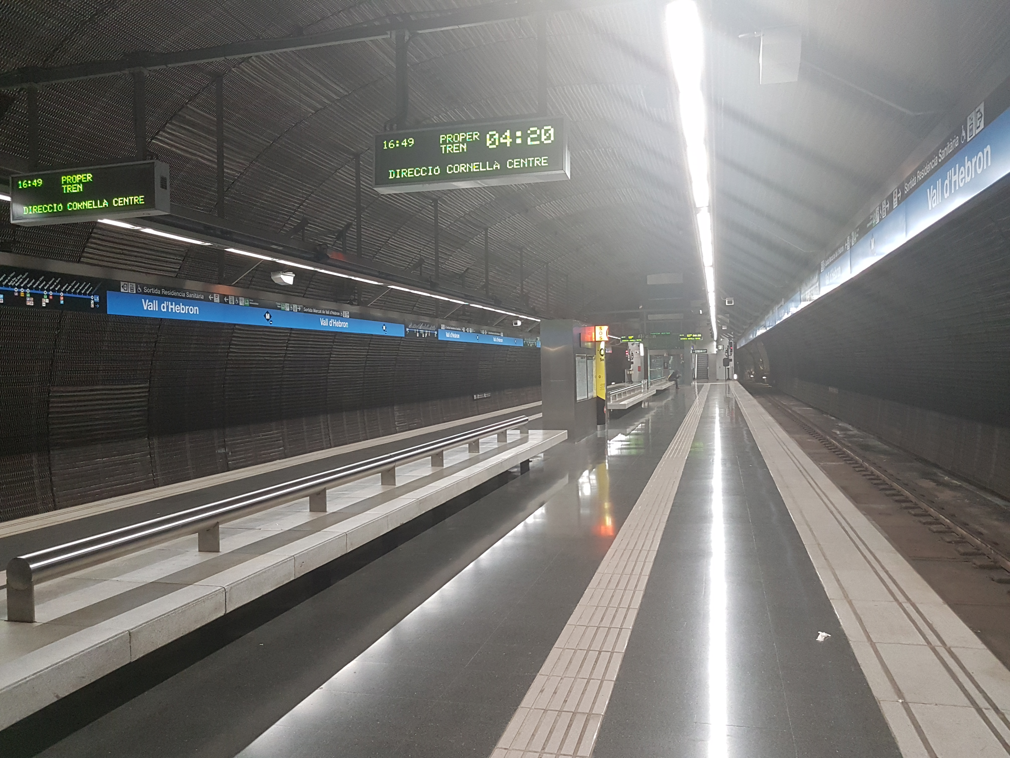 Estació de Vall d'Hebron de la L5 del metro de Barcelona